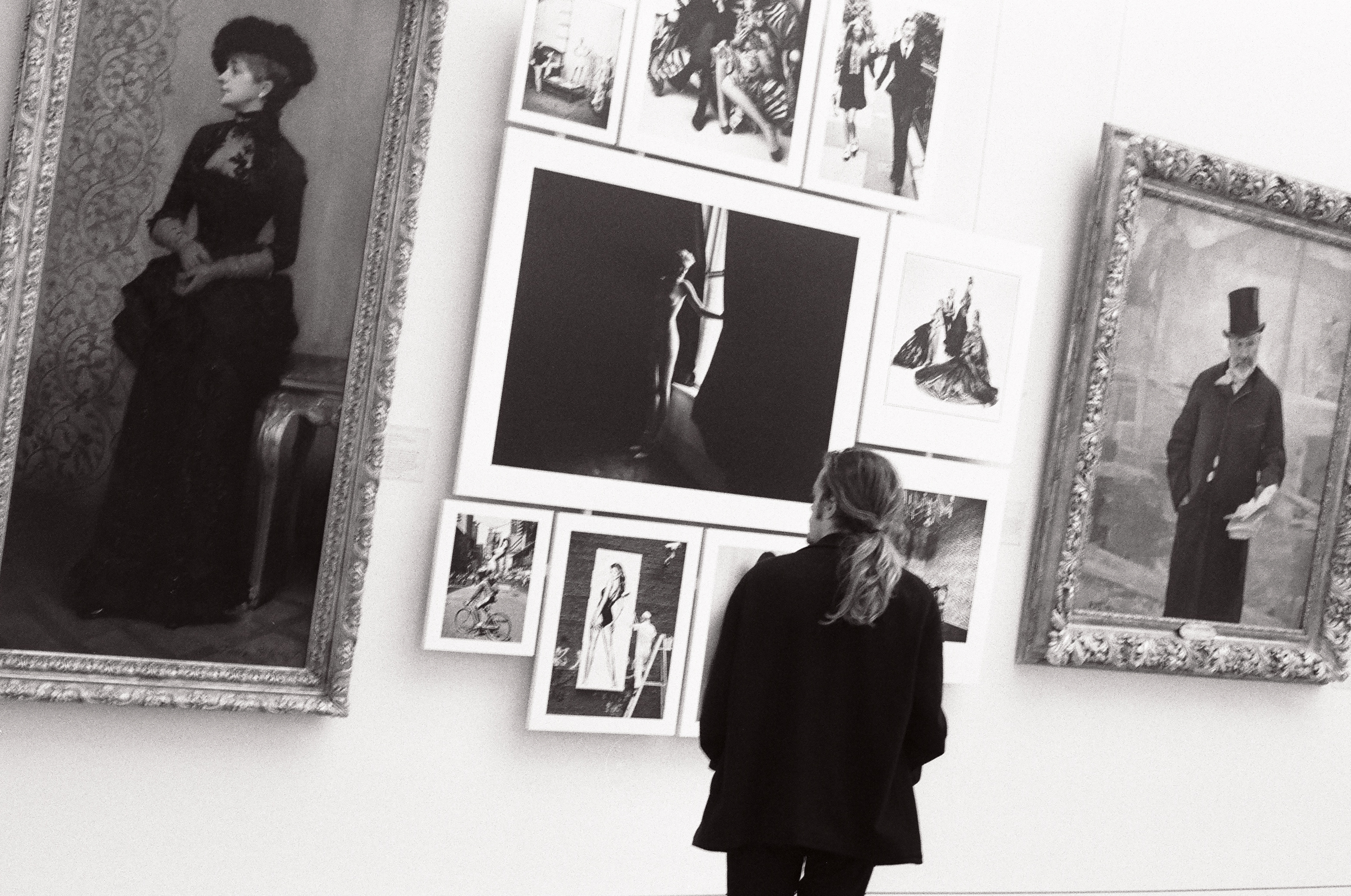 Ulike a trouvé une vidéo de cette expo ;-D c'est par là : Patrick Demarchelier